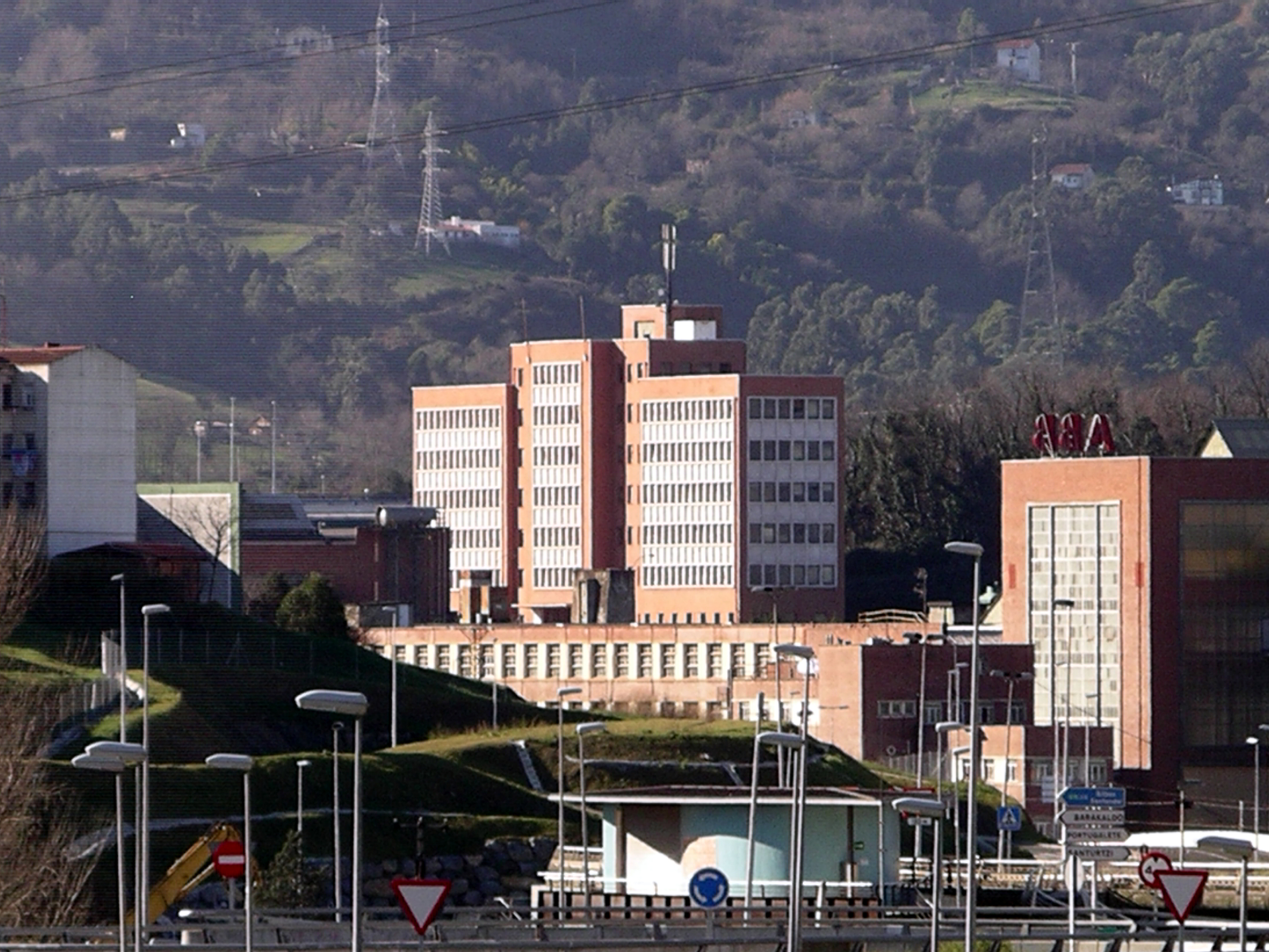 General Electricen aintzinako bulegoentzako eraikina, Galindon (Sestao, Bizkaia).